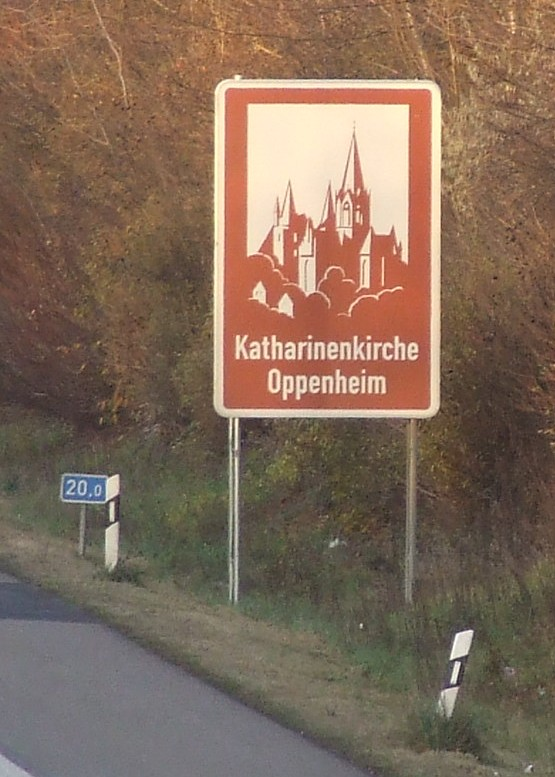 Bundesautobahn 63, Streckenabschnitt bei Autobahnkilometer 20,0 zwischen Biebelnheim und Wörrstadt